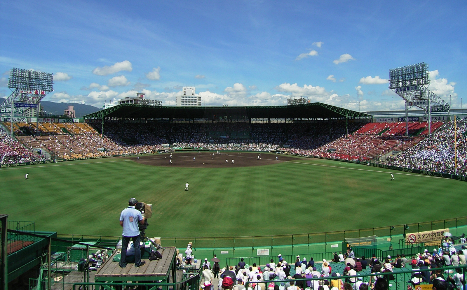 Hanshin Koshien Stadium